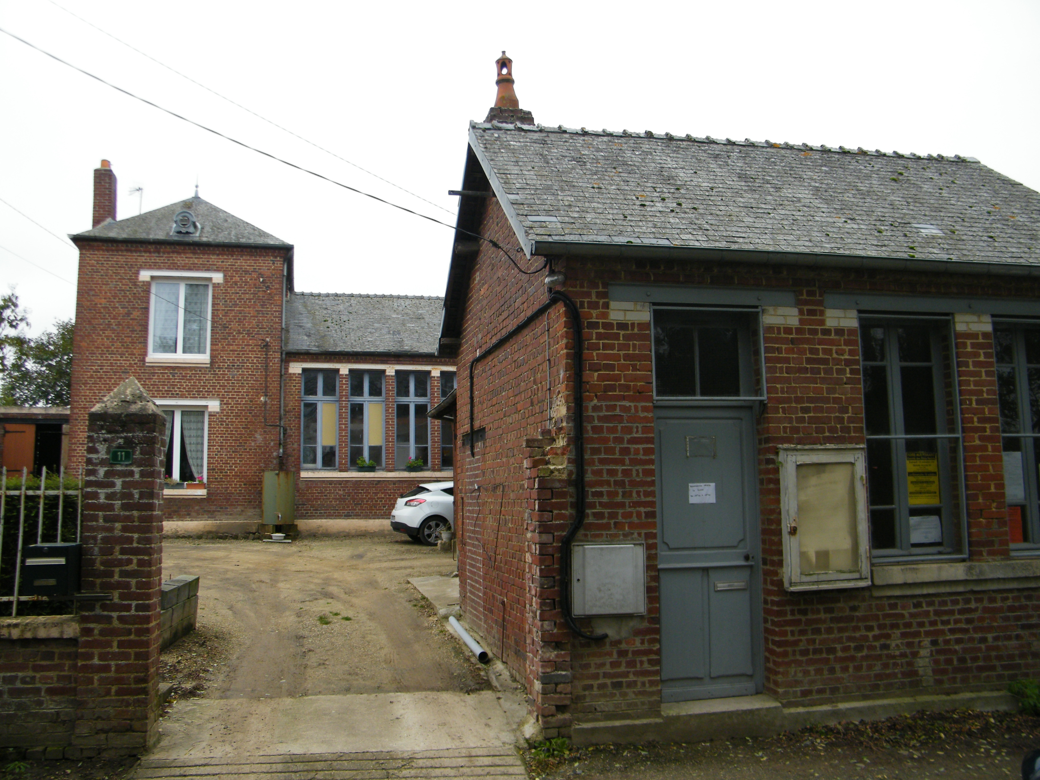 Bâtiments communaux : Herly.